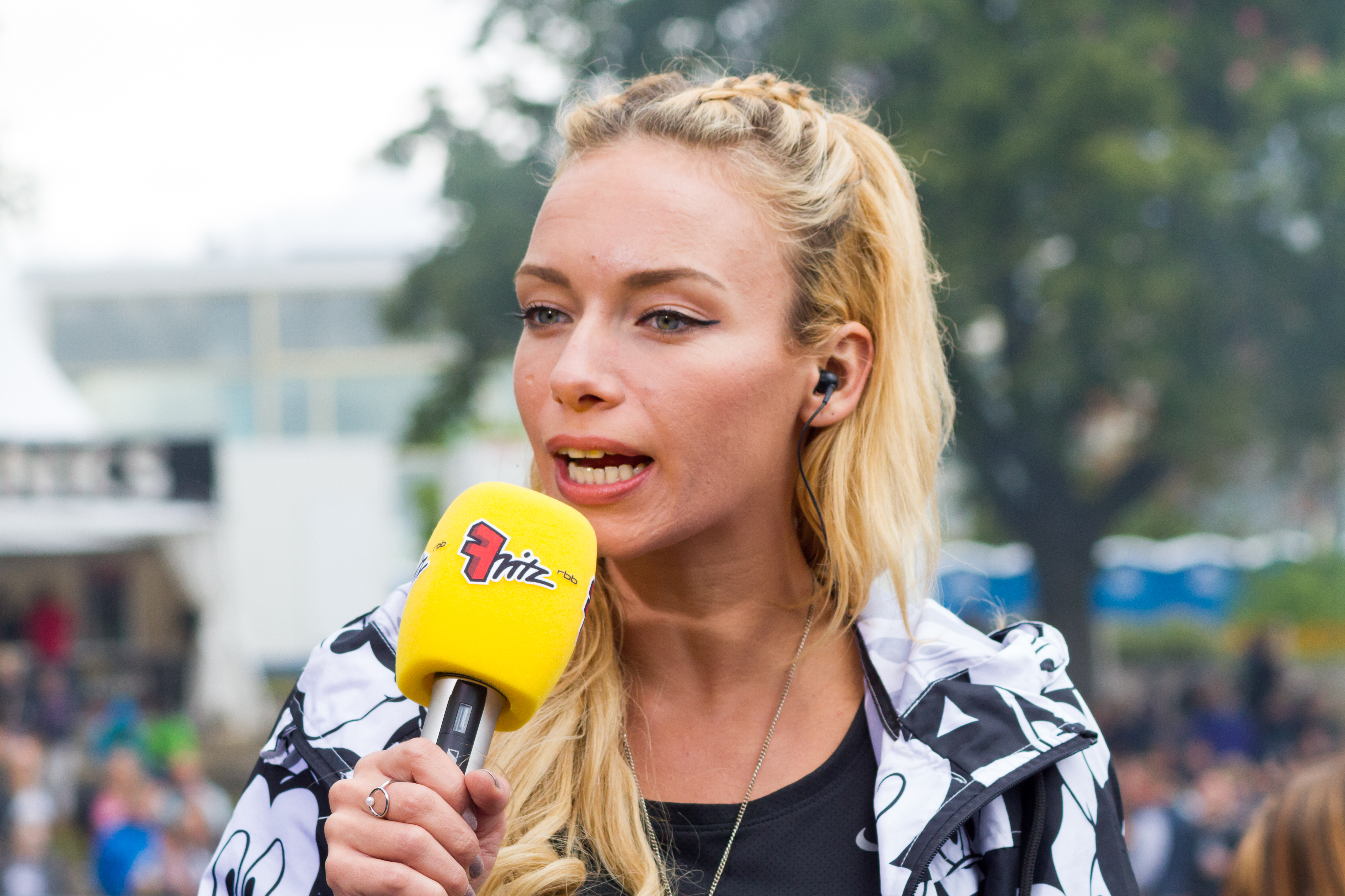 Visa Vie (alias Charlotte Mellahn) beim Fritz - Die Neuen DeutschPoeten Musikfestival vom 5. September 2015 das in Berlin stattfand.